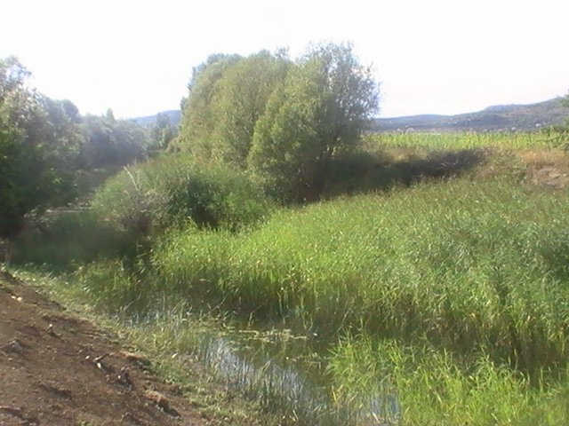 Rijeka Čikola kod Kričaka u blizini Drniša.